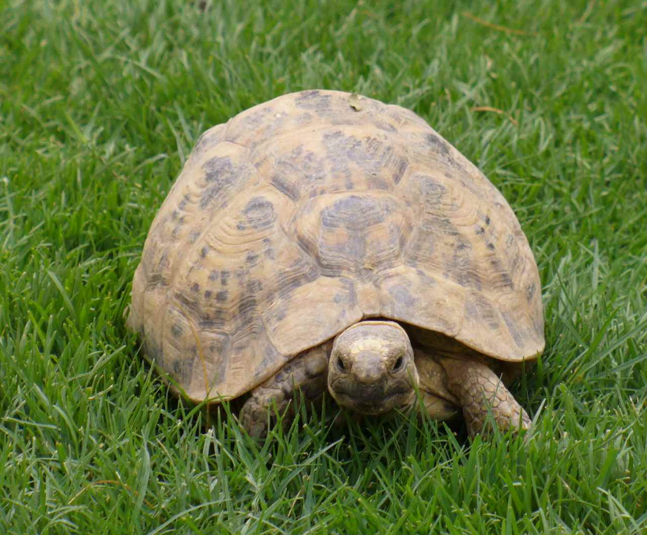 Negev Tortoise (Testudo kleinmanni), Guest house - Luxor, Egypt